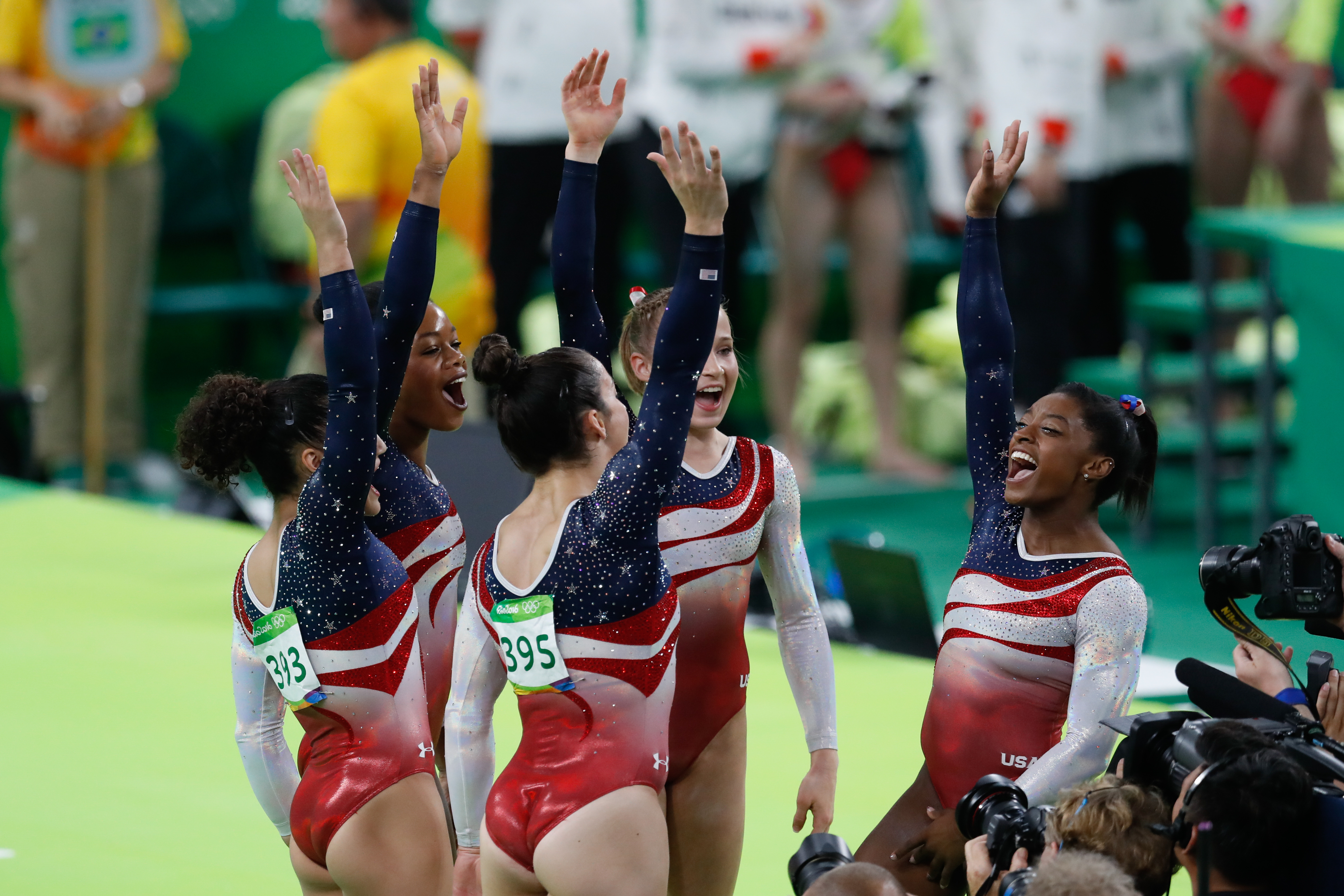 Rio de Janeiro - Ginastas dos Estados Unidos comemoram medalha de ouro na disputa por equipes feminina nos Jogos Olímpicos Rio 2016. (Fernando Frazão/Agência Brasil)